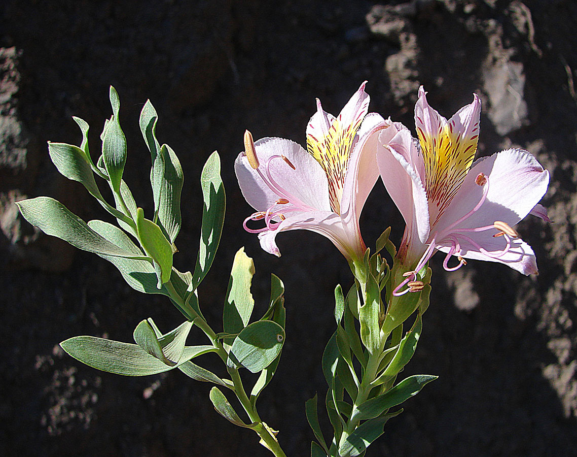 Alstroemeria exserens TEno alpine DG.Jan07